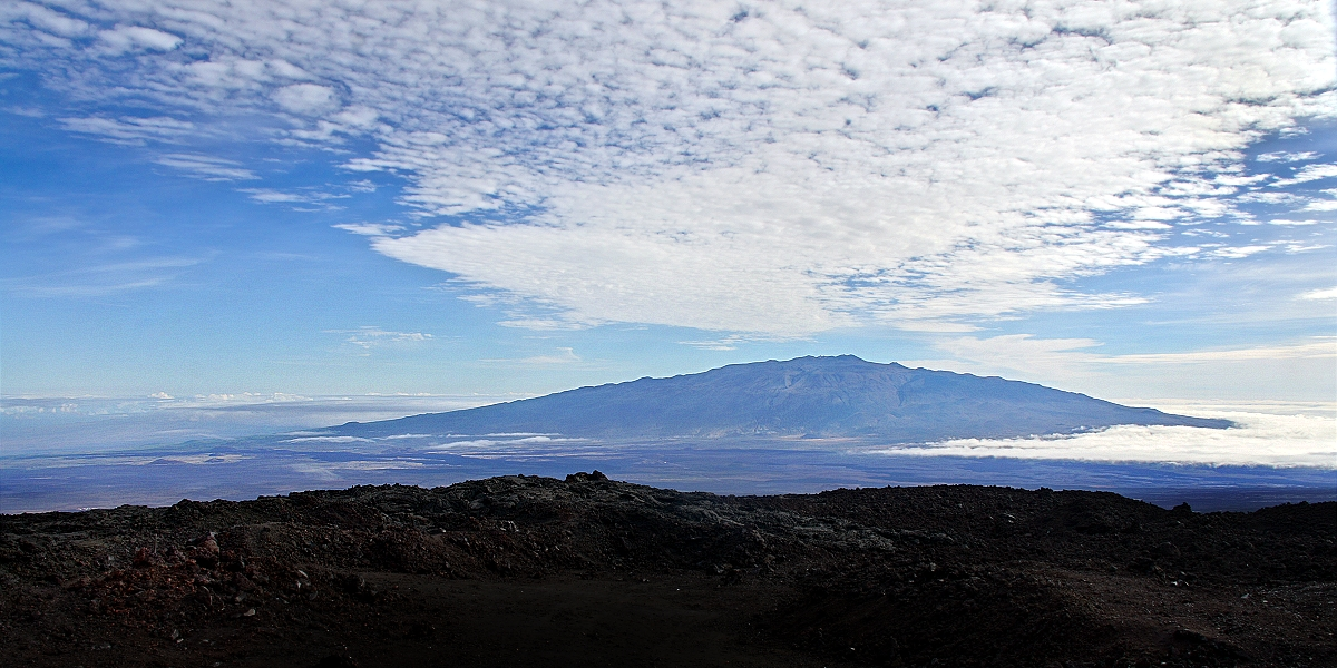 Иллюстрация для викиучебника Гавайеведение